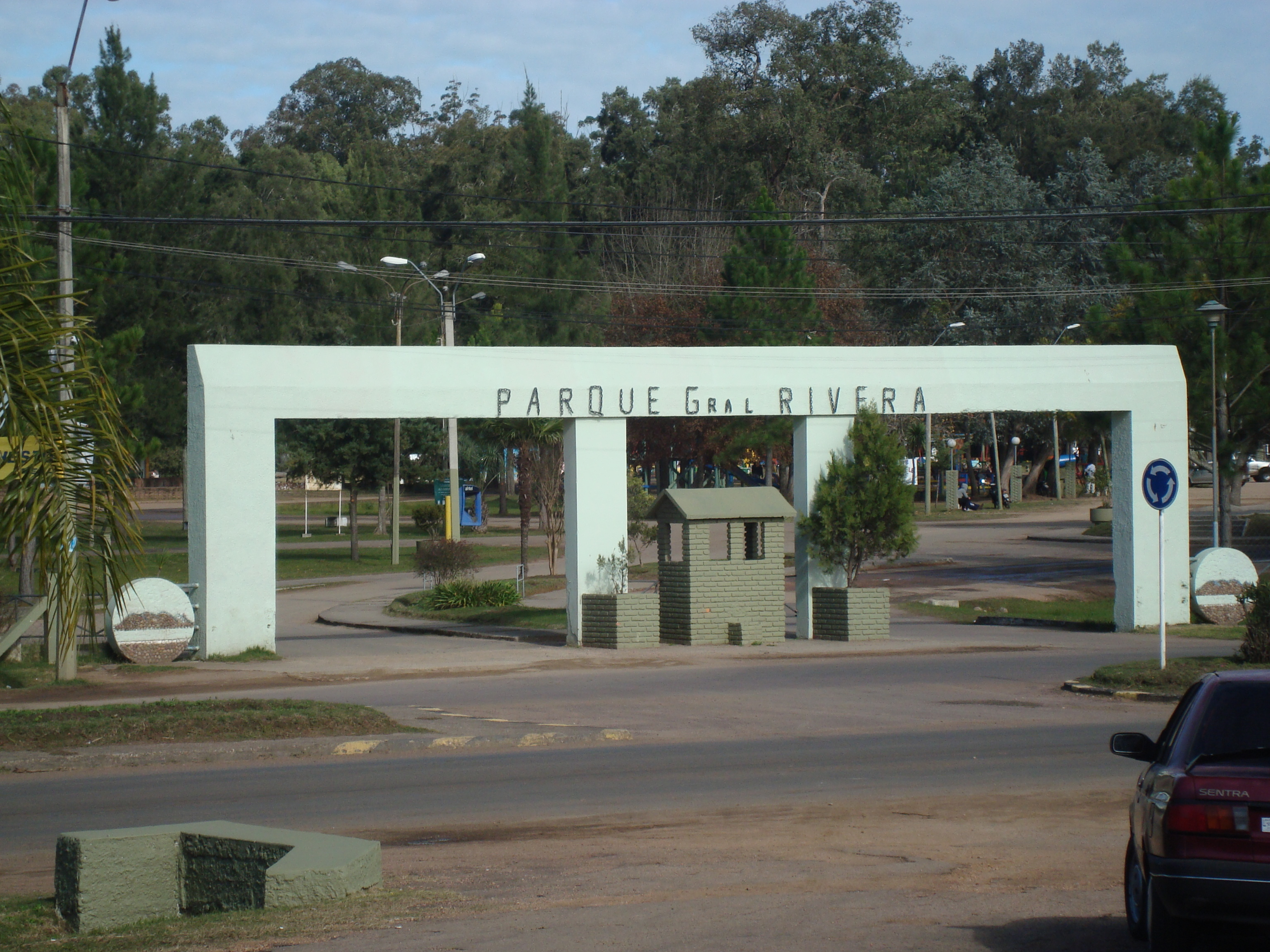 Vista de la entrada al Parque General Fructuoso Rivera desde afuera.